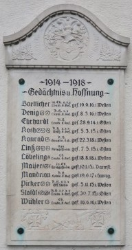 Gedenktafel für die 12 Gefallenen des Corps Franconia Darmstadt im Ersten Weltkrieg